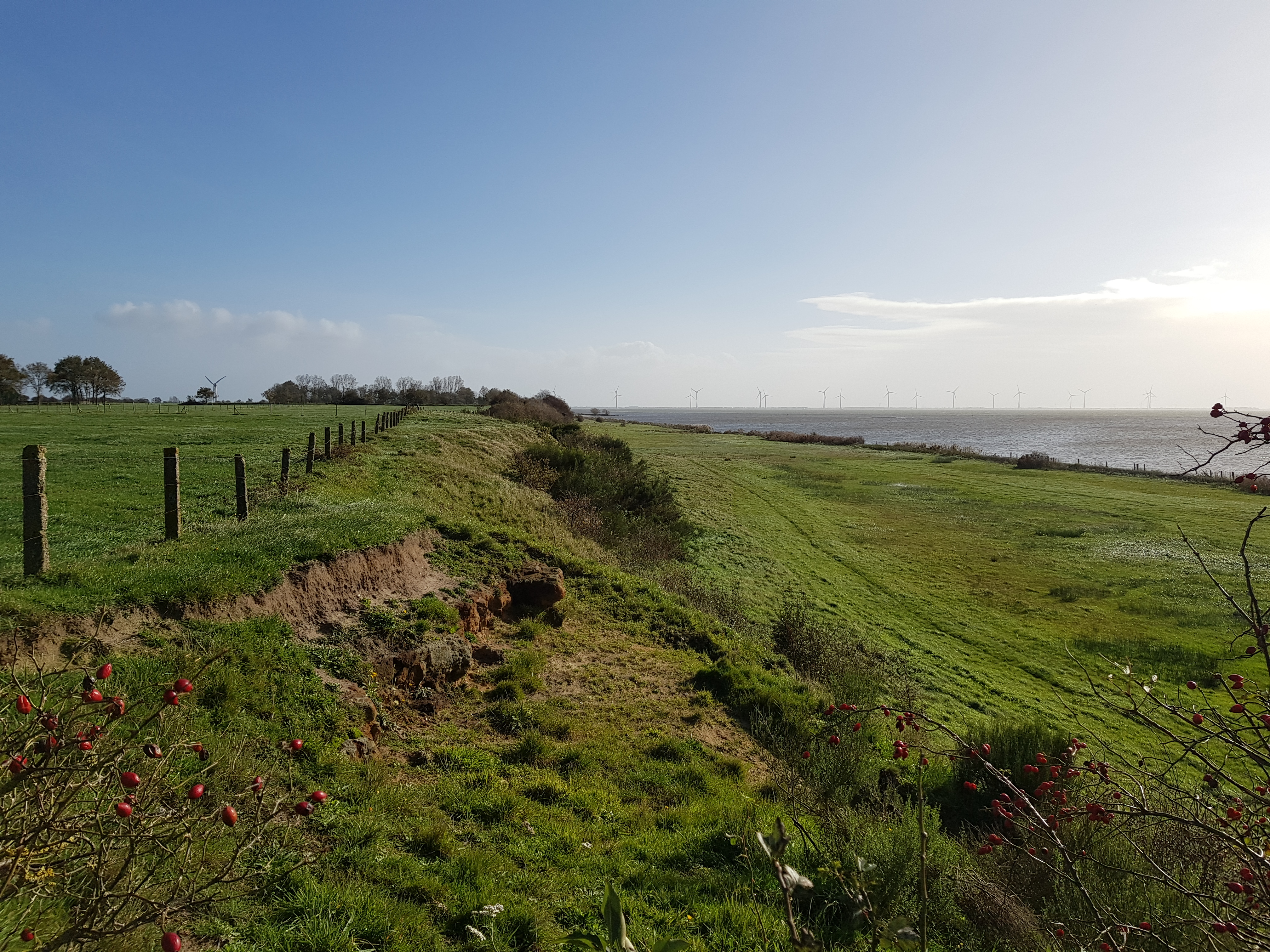 Oudemirdumer Klif, Oudemirdum, Friesland, Nederland